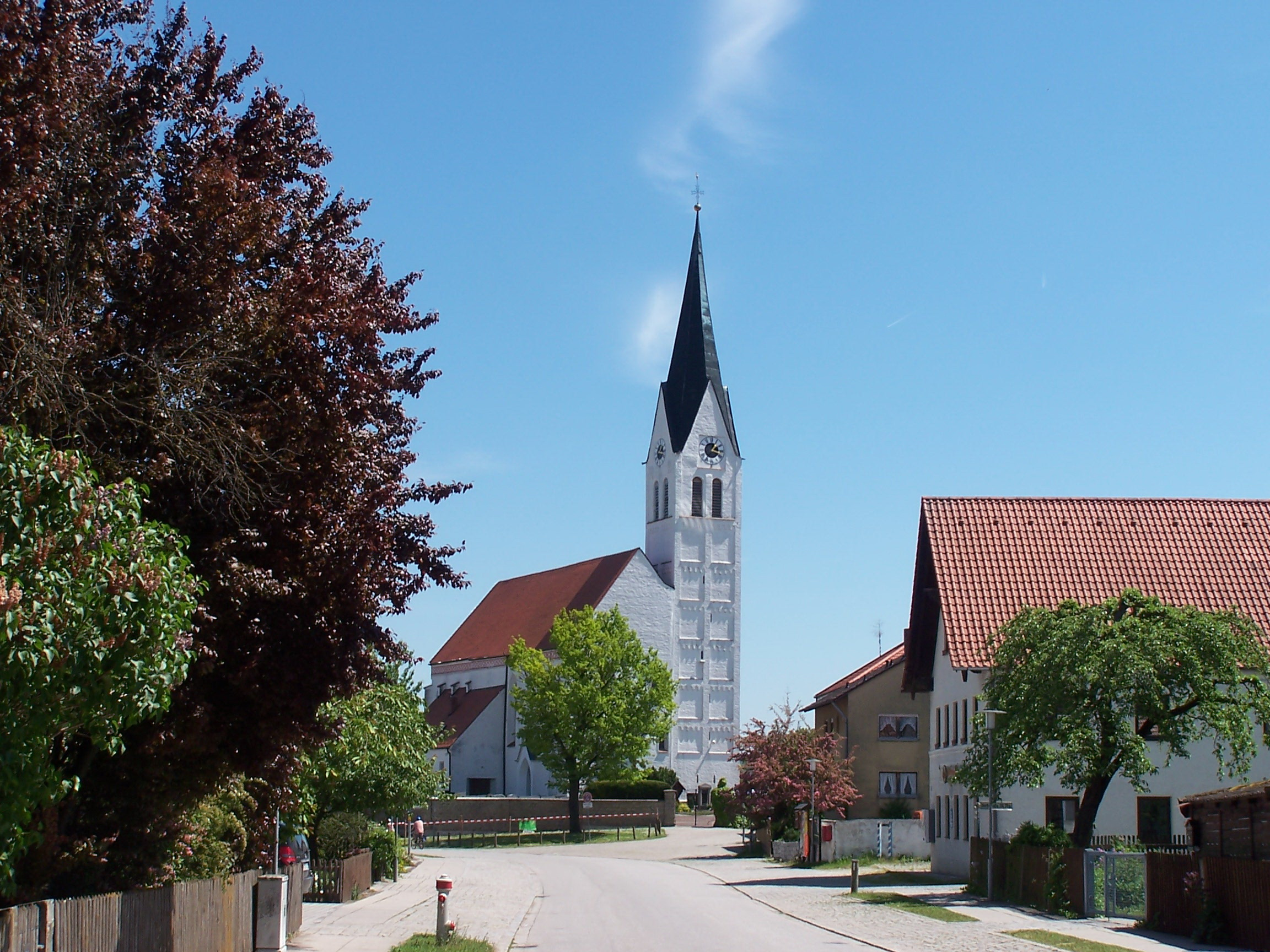 Essenbach-Altheim. Kath. Pfarrkirche St. Peter. Spätgotische Anlage um 1456, Langhausmauern und Turm im Kern noch spätromanisch; mit Ausstattung.